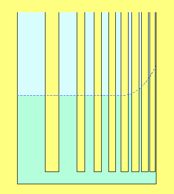 Niveau d'un liquide dans un ensemble de tubes capillaires par rapport au niveau de la surface libre du liquide dans des tubes de section ne faisant pas intervenir la capillarité appartenant tous à un même système de vases communicants.